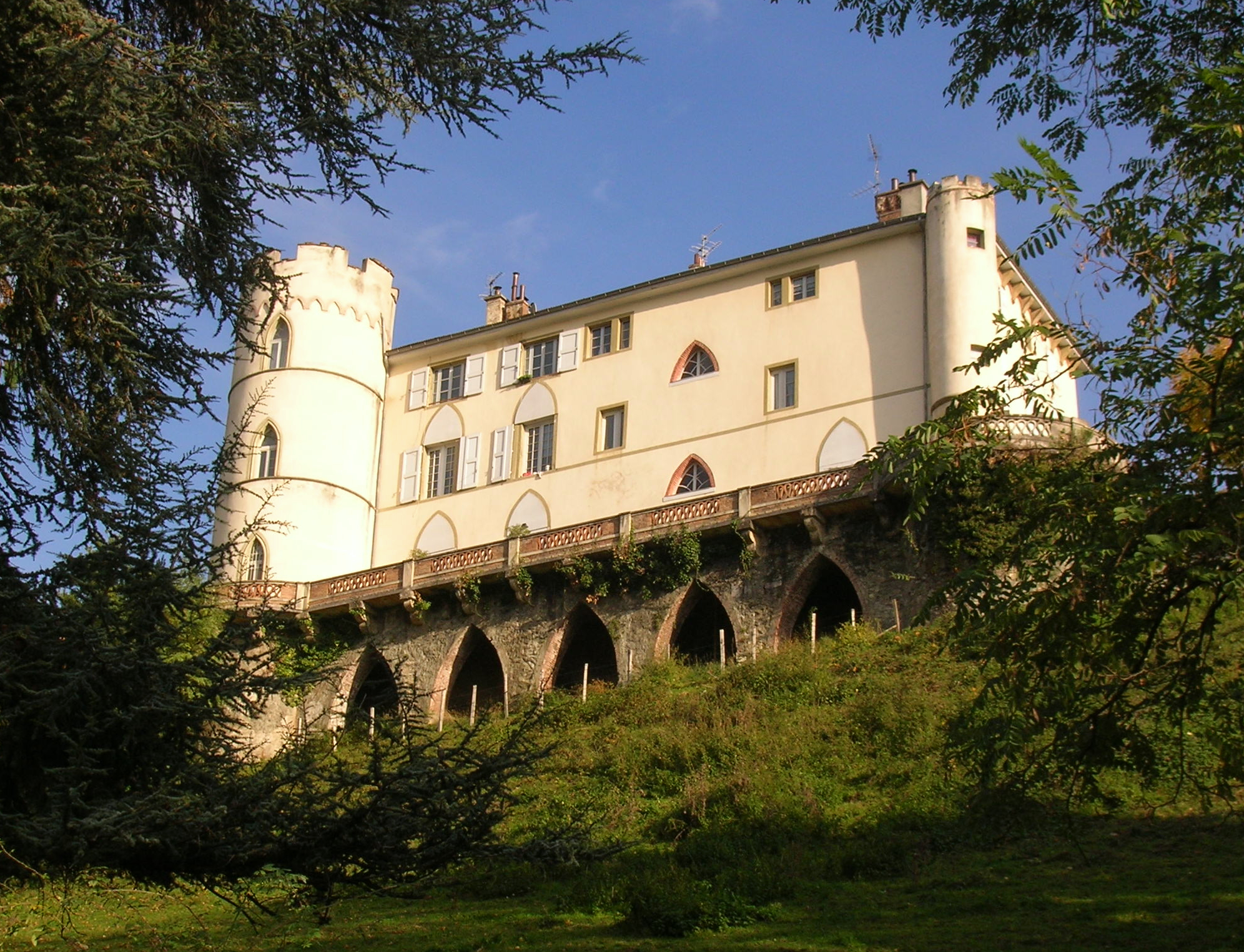 Château de La Combe-de-Lancey, Isère, France.